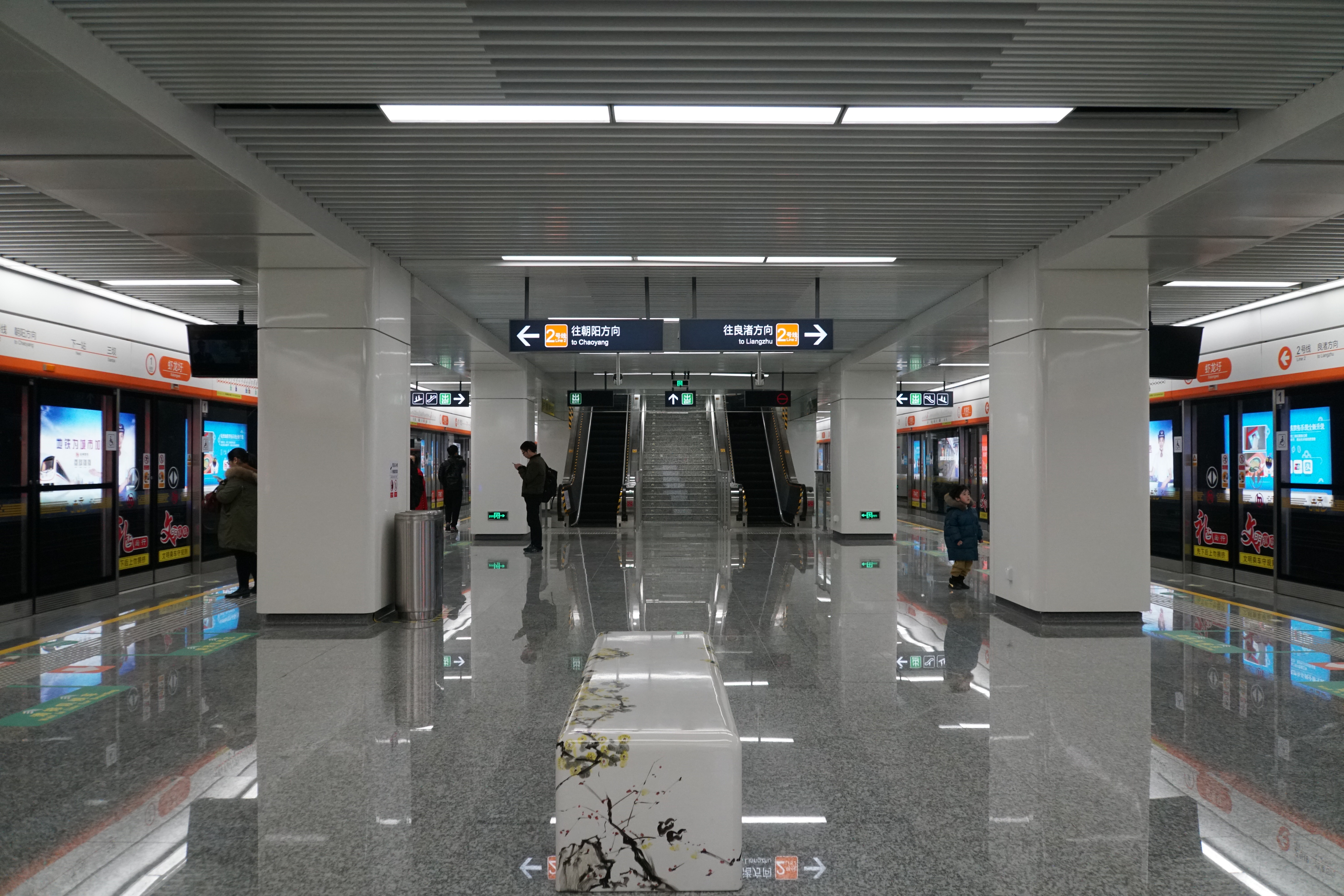 虾龙圩站站台